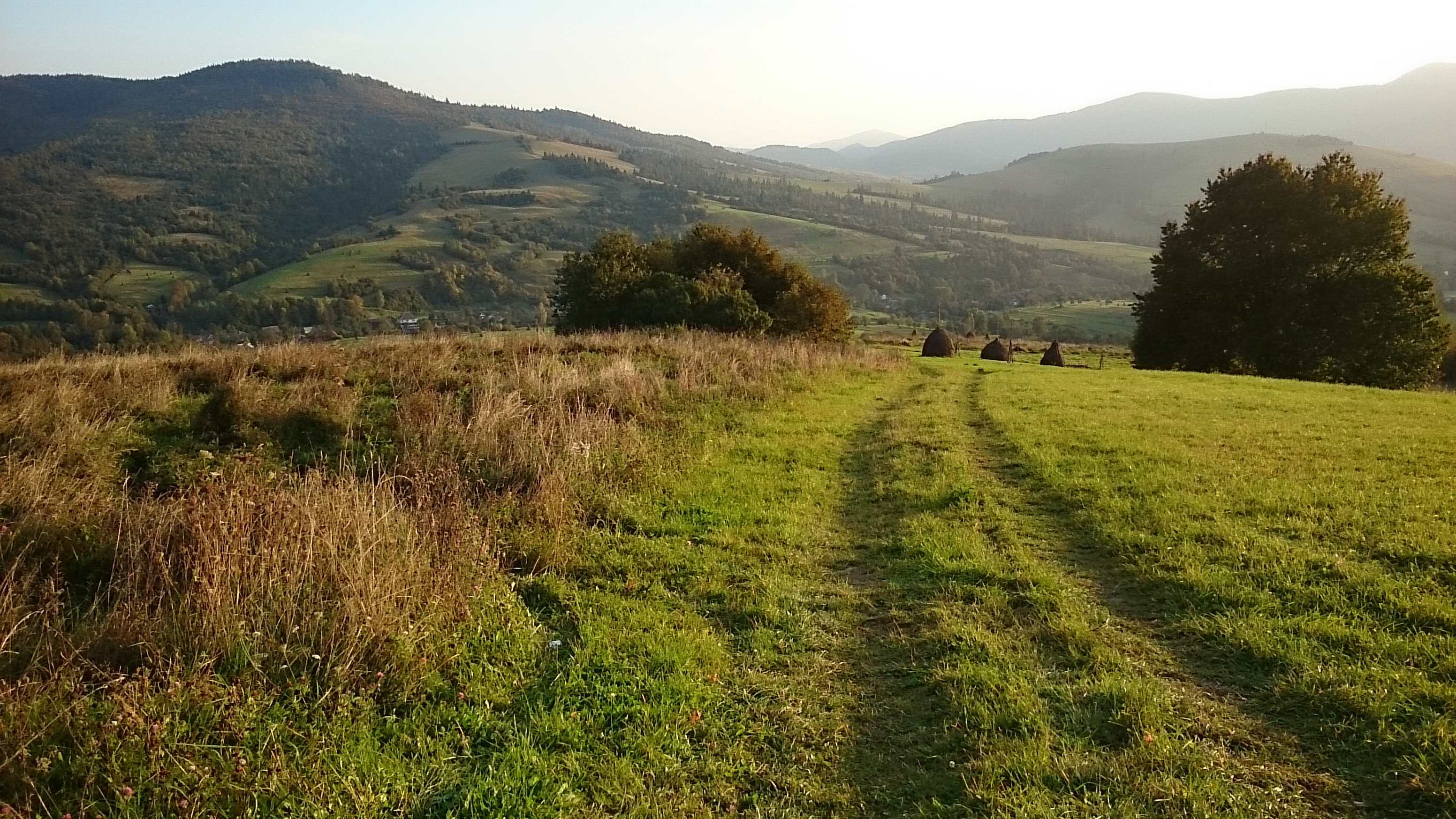 Горы в районе села Климец, Сколевский район, Львовская область